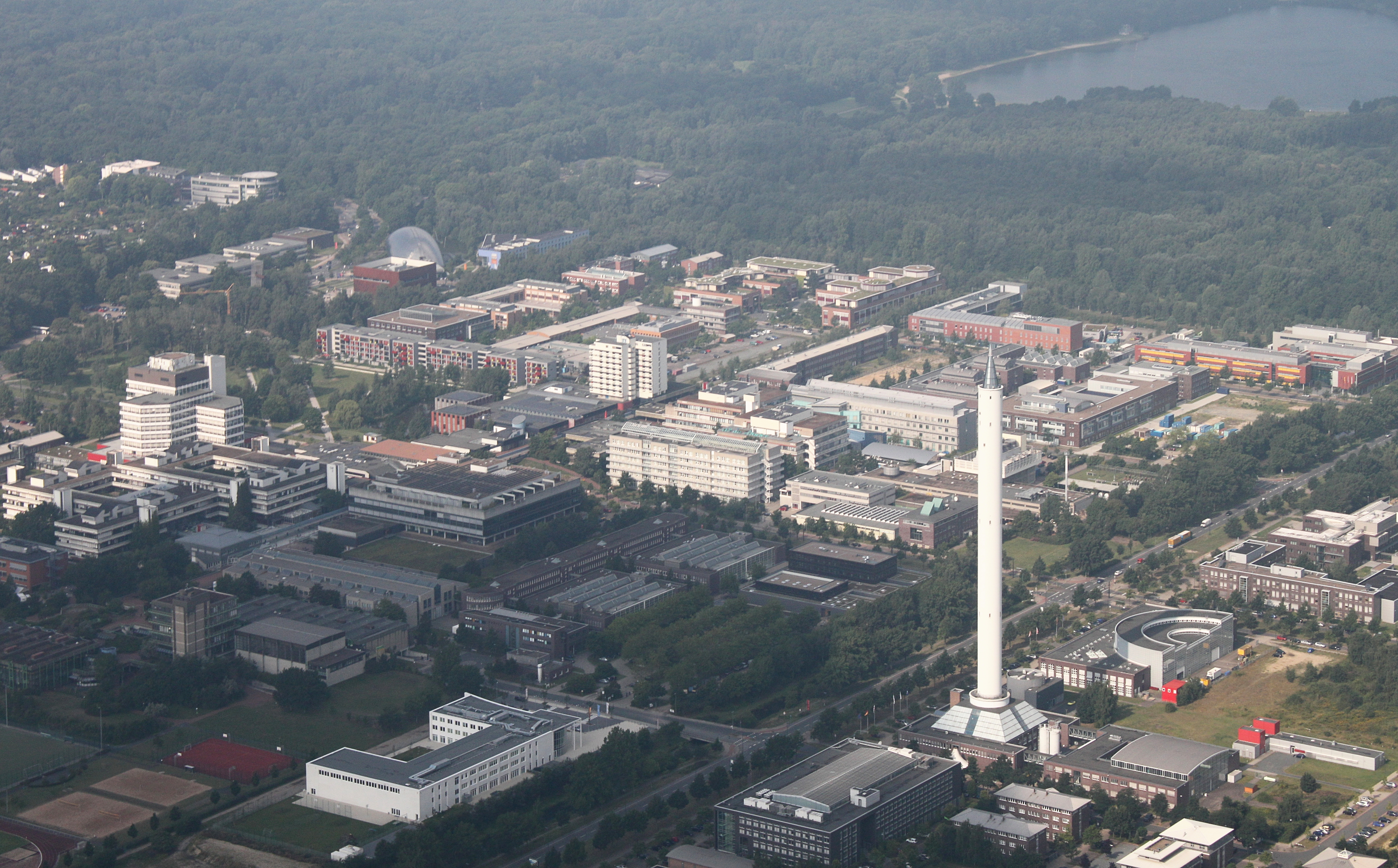 Luftaufnahme Bremen; entlang der A27; Uni Bremen; Flughöhe 500 m